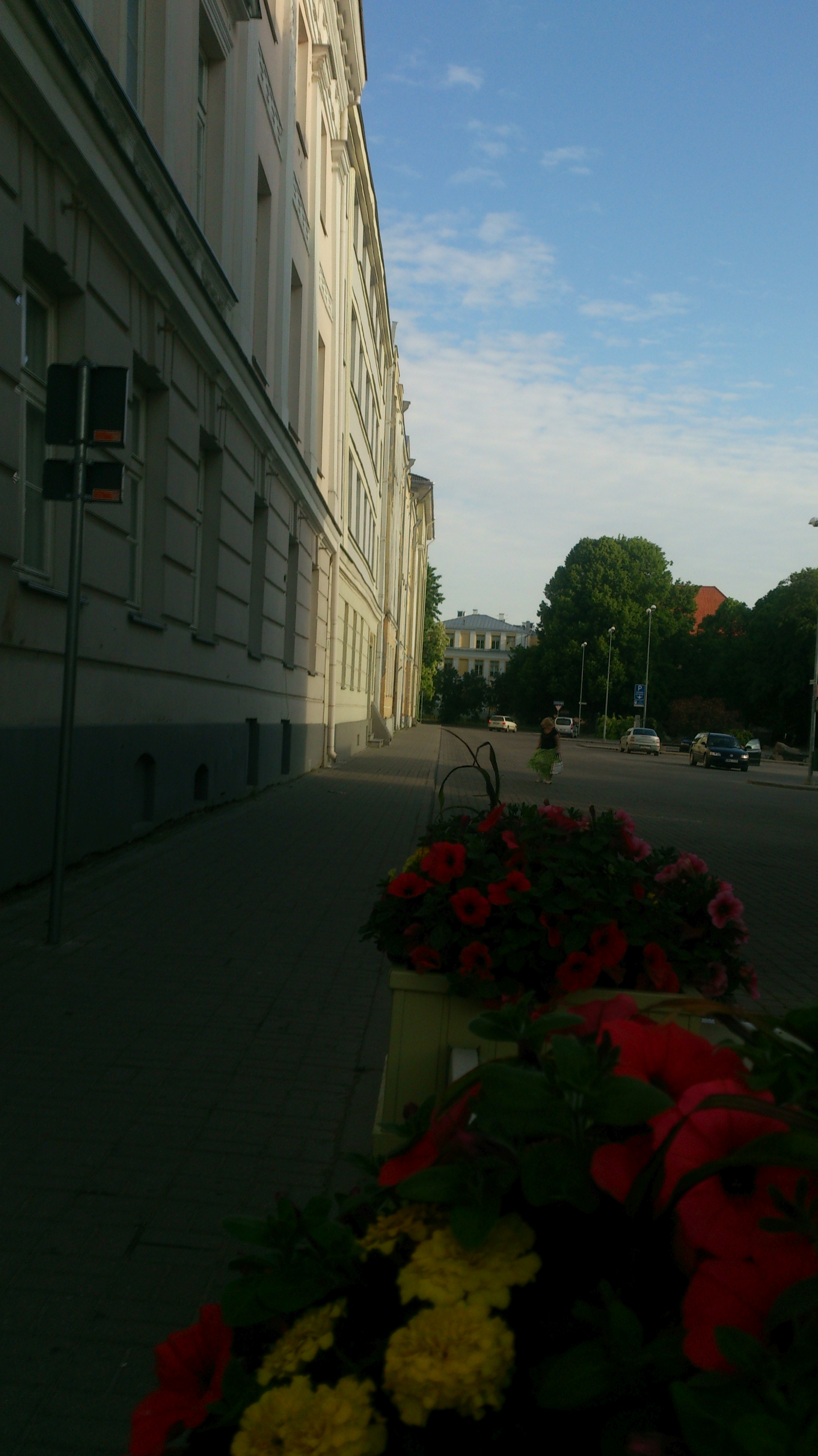 Magistri tänav, varane suvehommik juunis 2015